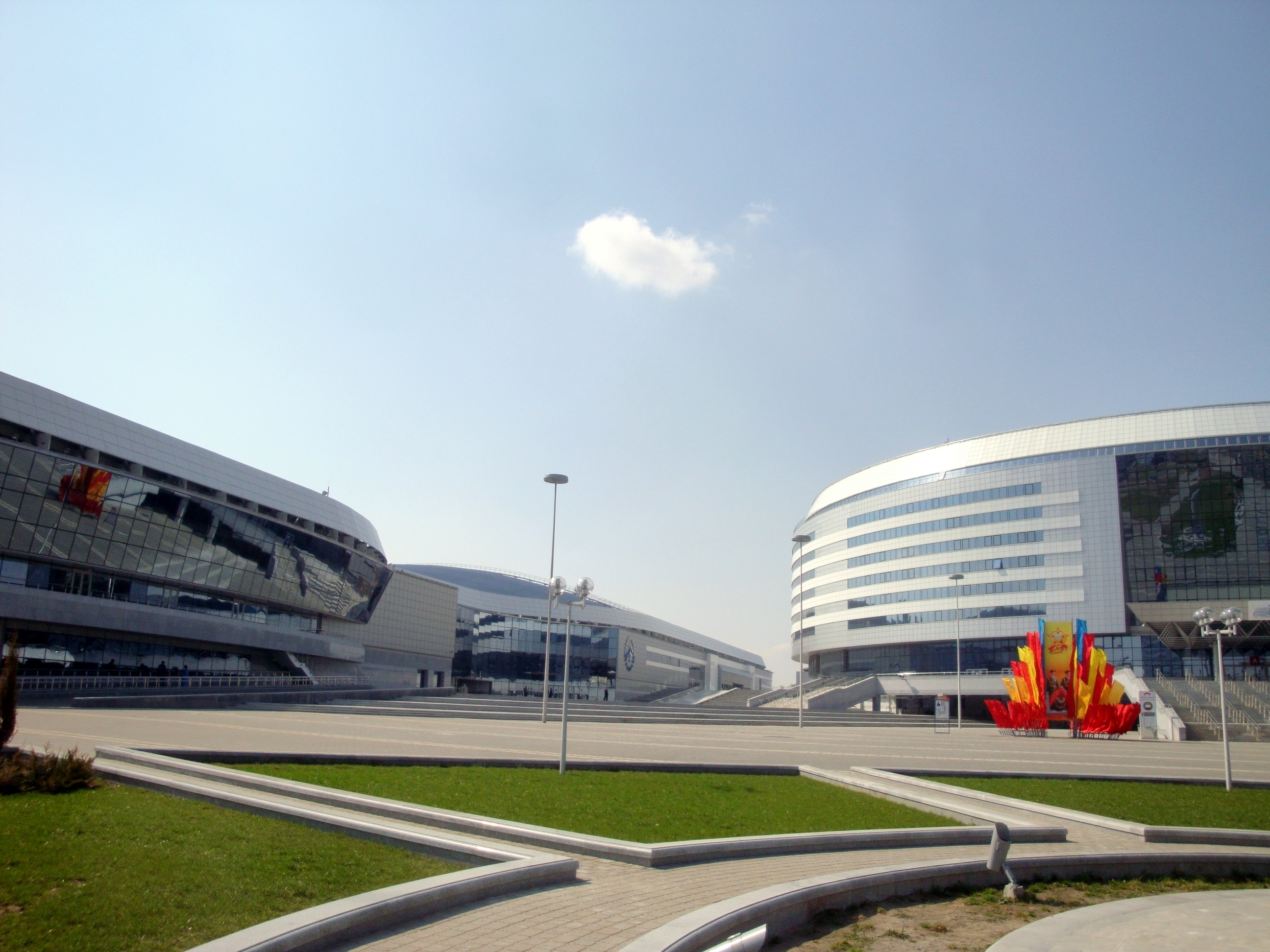 Minsk, new large ice hockey hall / velodrome / skaters hall